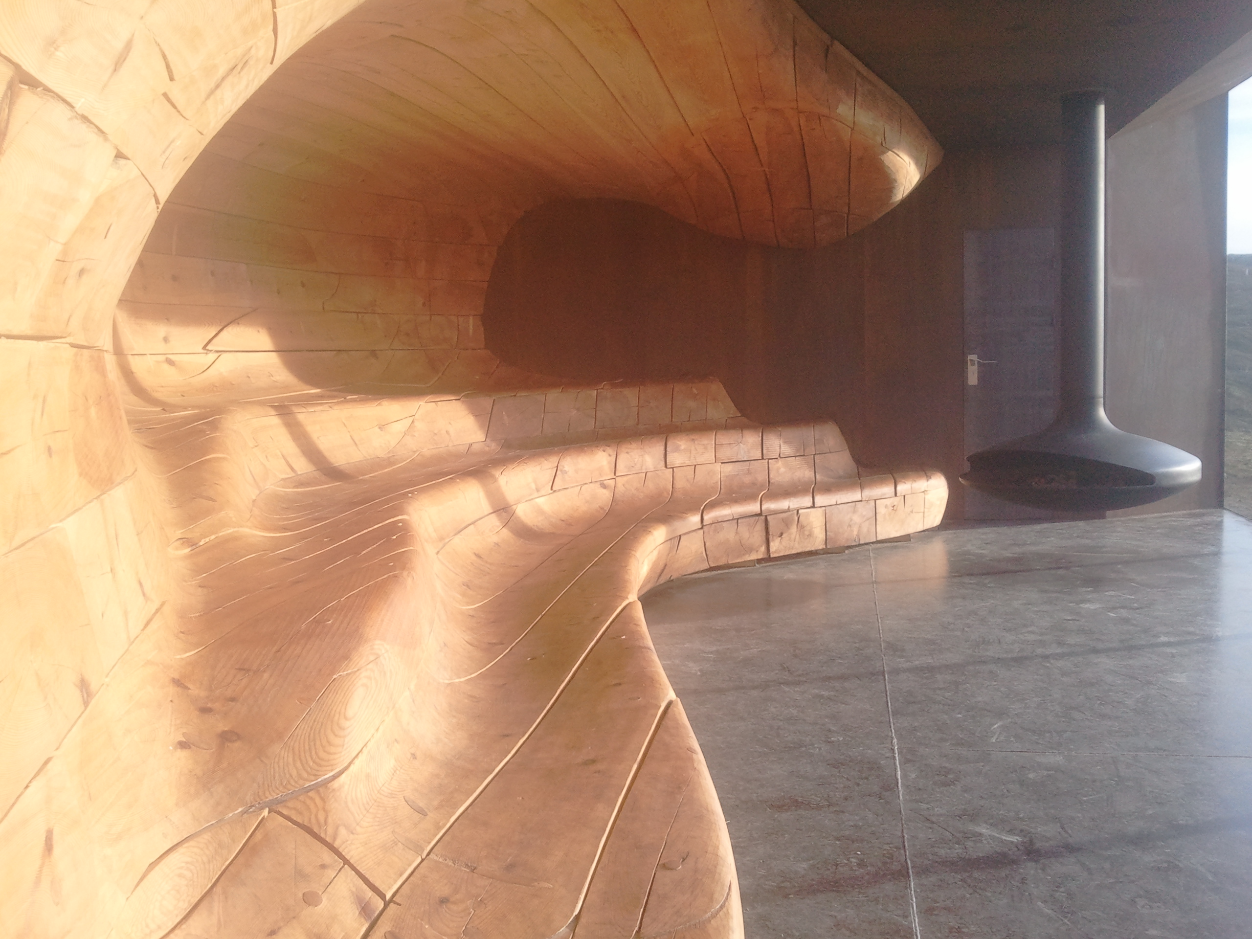 Viewpoint Snøhetta, interiør